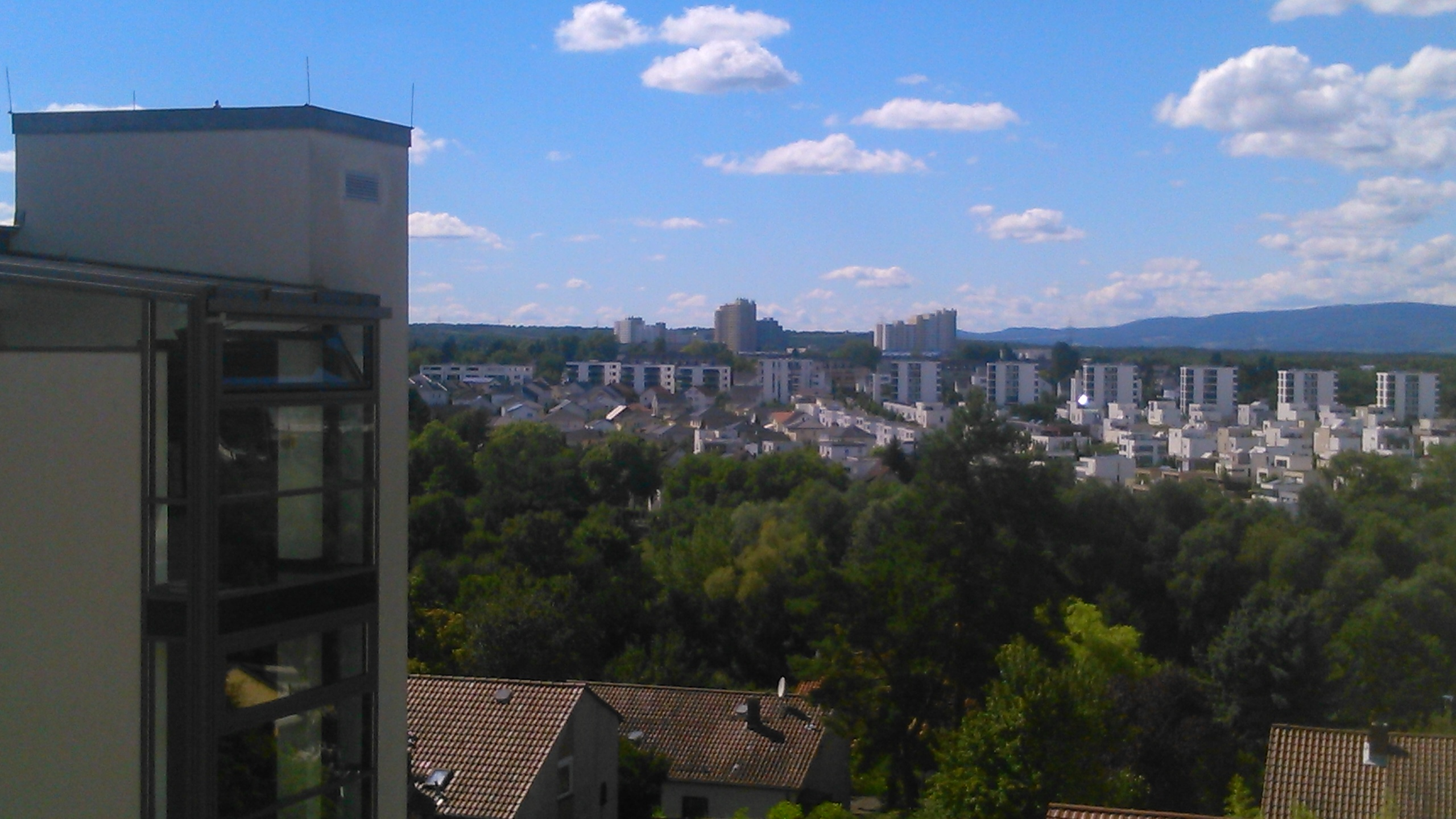 Blick auf das Gonsbachtal und die Wohnanlage Diana am Wildpark aus Richtung Hartenberg-Münchfeld